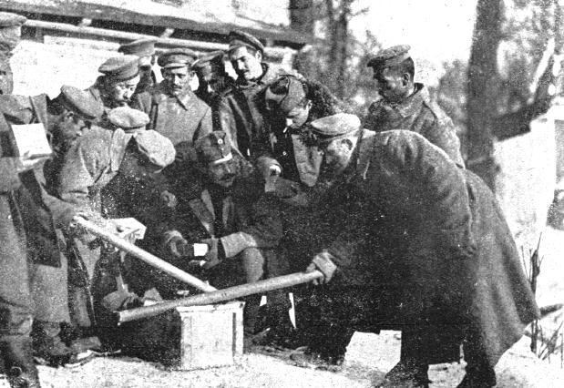 Ruski in avstro-ogrski vojaki med premirjem zamenjujejo različno blago